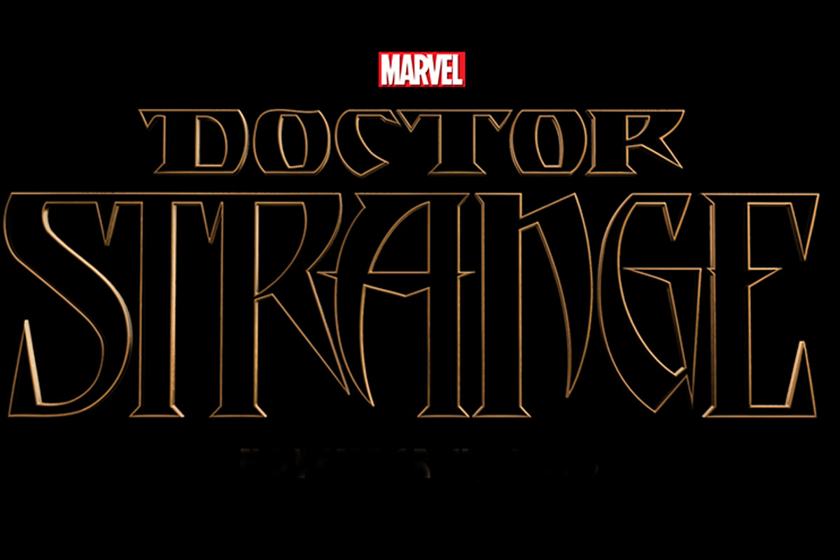 Logo oficial de la película Doctor Extraño